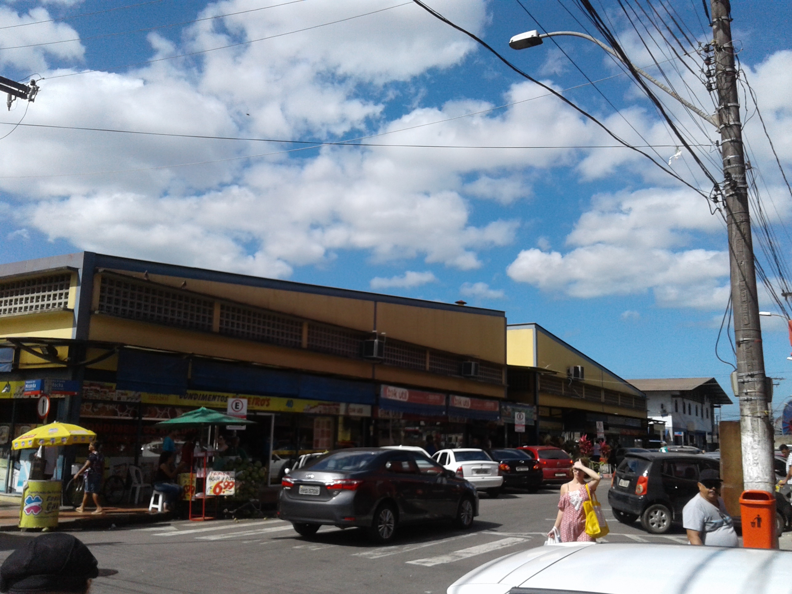 fachada do mercado.